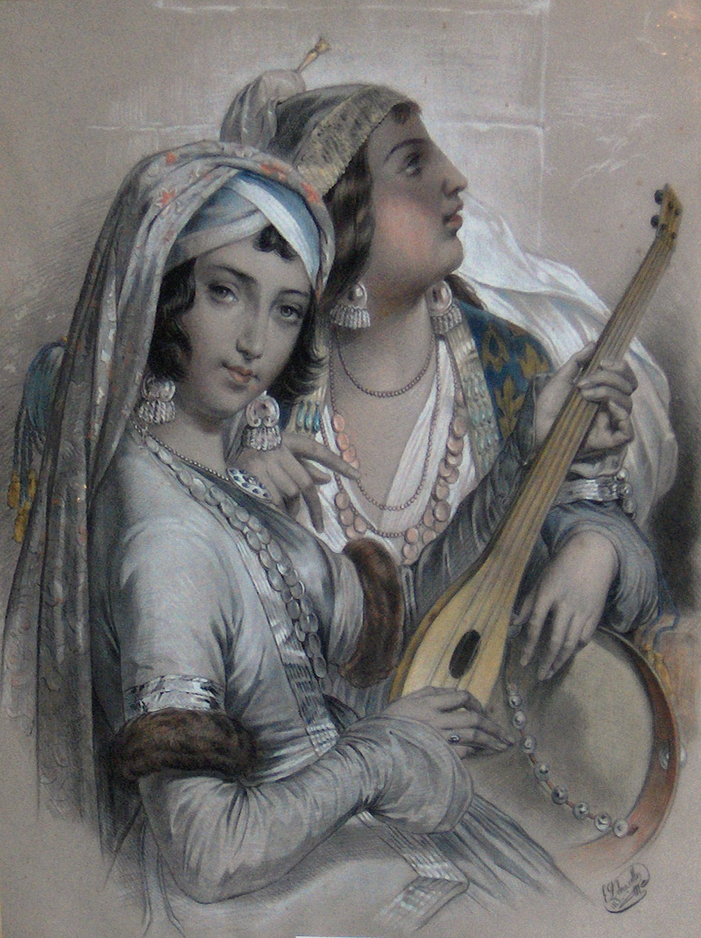 "Muzikale zigeunermeisjes", oriëntalistische tekening en gemengde techniek door Edouard Debruxelles (1835-1871)